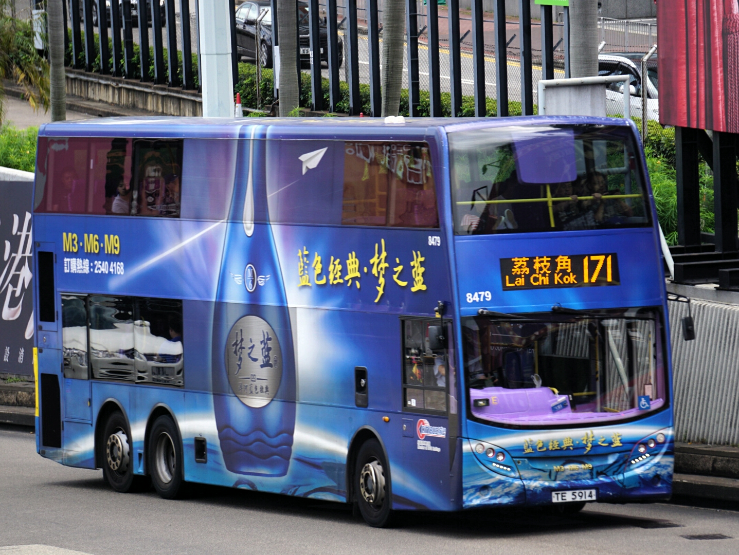 中文（香港）: 過海隧道巴士171線，剛駛出紅磡海底隧道